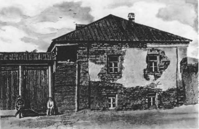 Tolkachev's house, it is more famous as Pugachev's palace